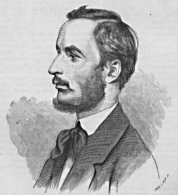 Keleti (Kelety) Gusztáv (1834–1902). Pollák Zsigmond metszete (Vasárnapi Ujság, 1869. április 11.)